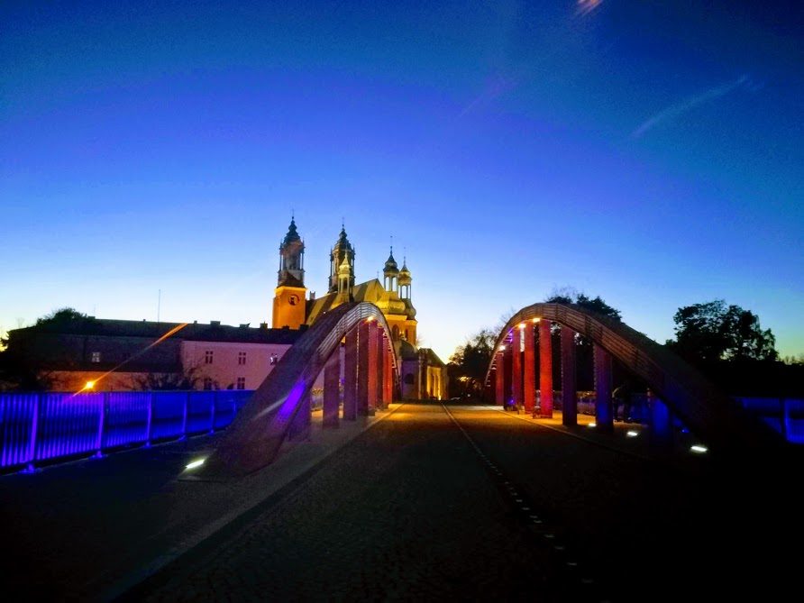 Мост Йордана ночью